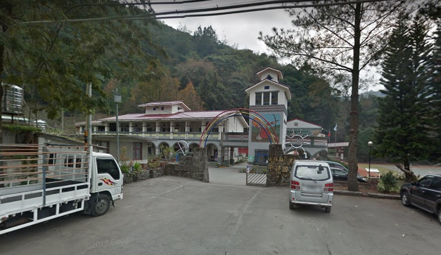 2007年劇組拍攝時政府正名仍為平靜國小 劇中名為庫達國小 現改名為都達國小